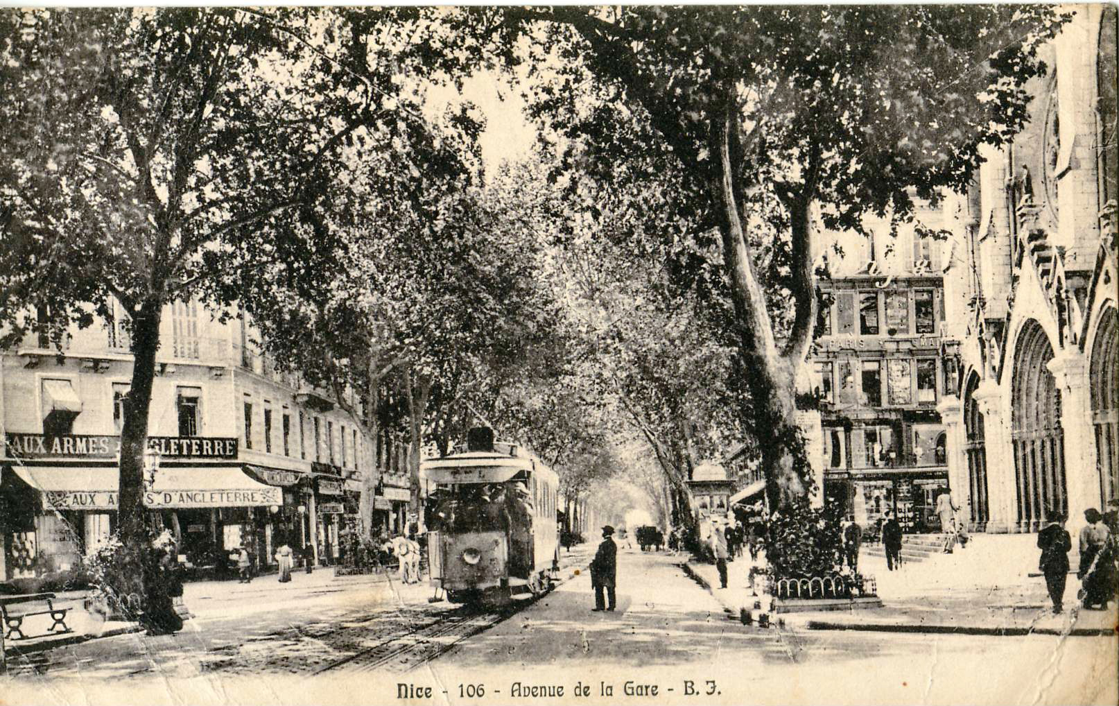 Carte postale ancienne éditée par BJ, n°106 : NICE - Avenue de la Gare